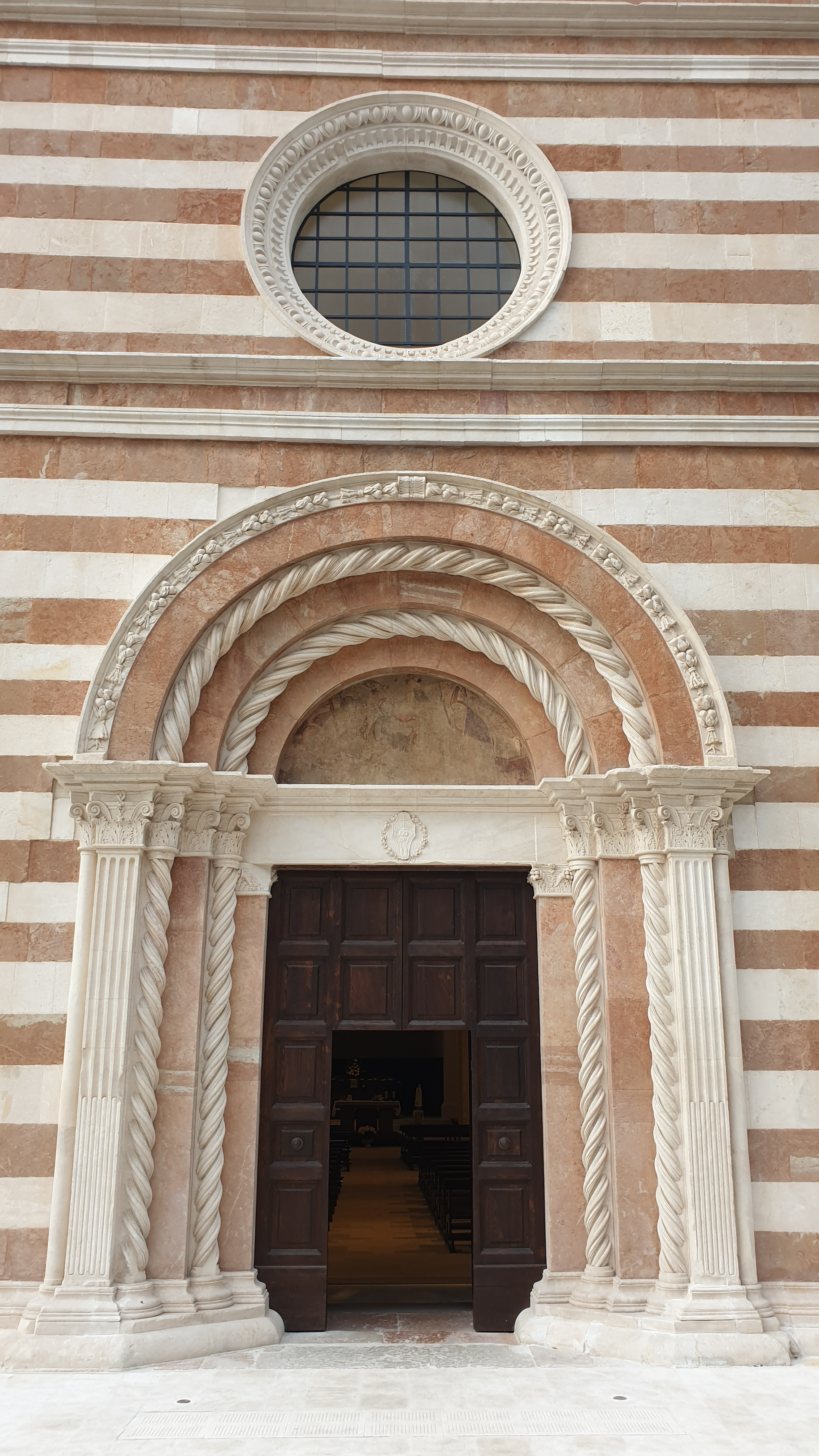 L'Aquila: chiesa di Santa Maria del Soccorso